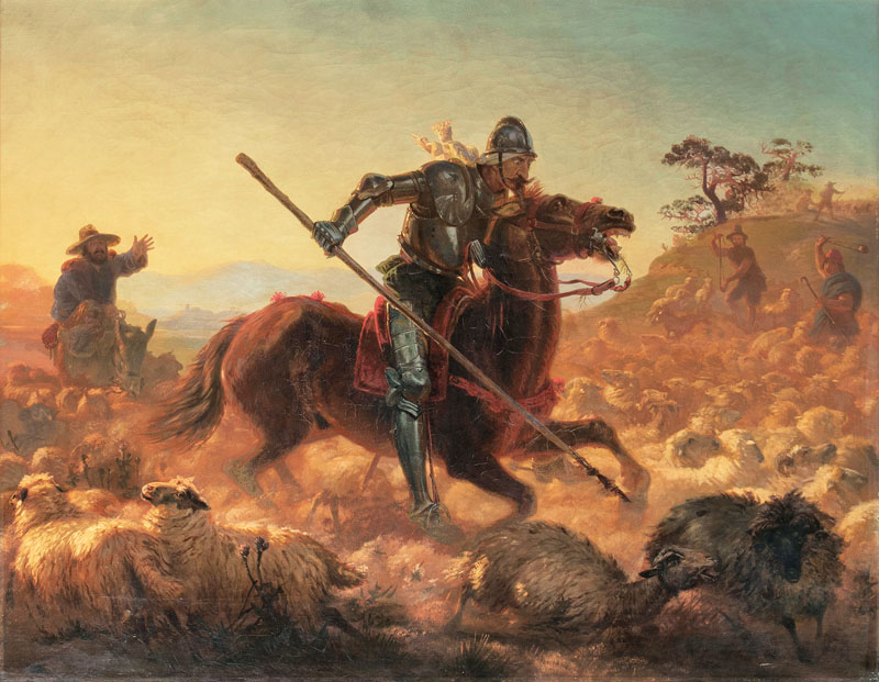 Don Quijote, l. u. signiert und datiert J. B. Zwecker 1854